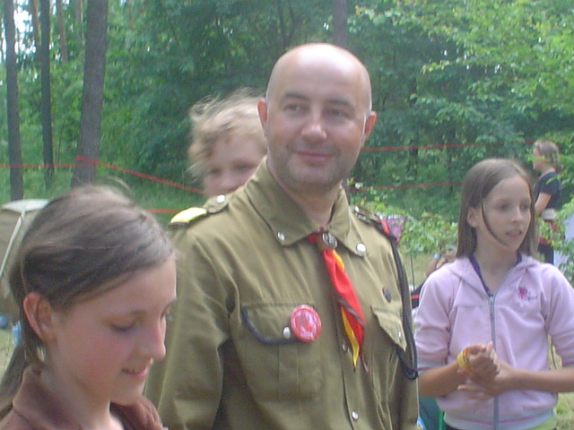 Komendant OH "Rodło" - hm Tomasz Wencek